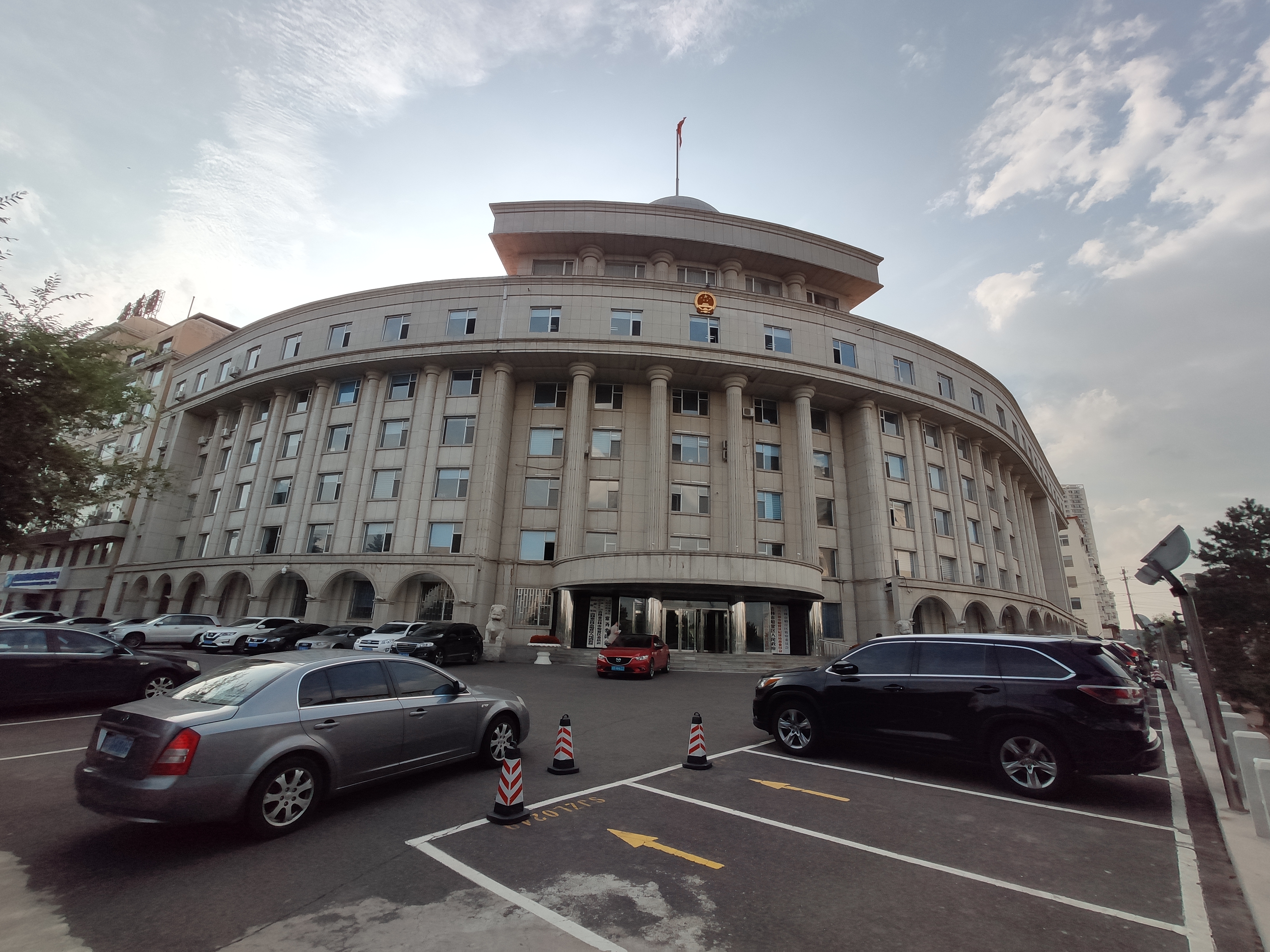 船营区人民政府大楼